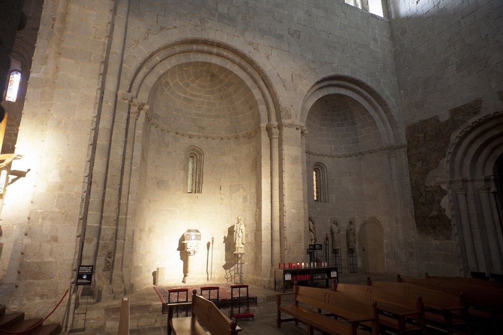 unidentified Spain